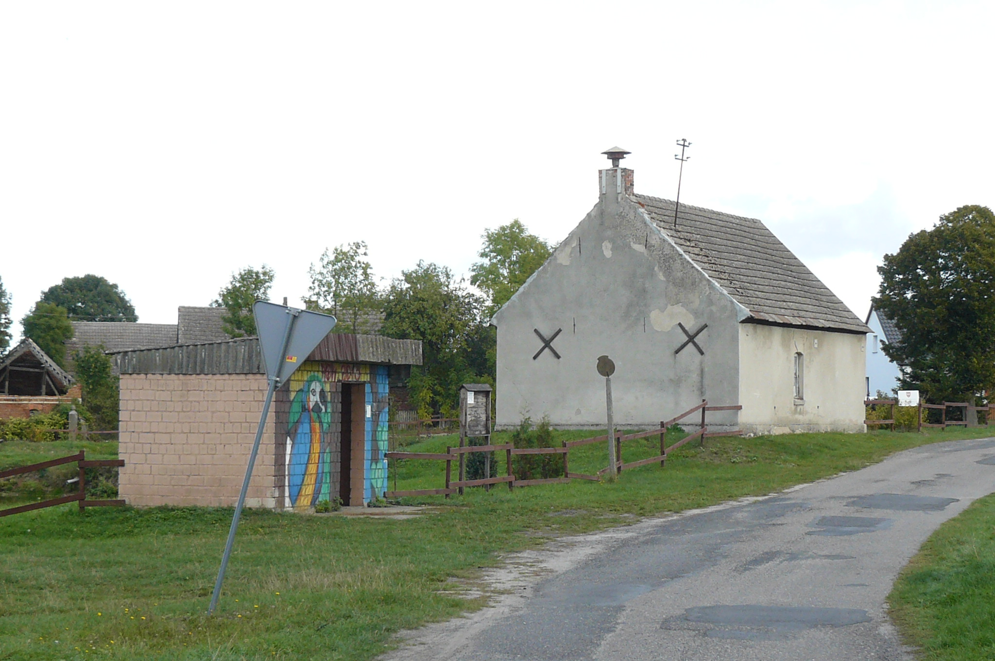 Radom - wieś w gm. Ryczywół.